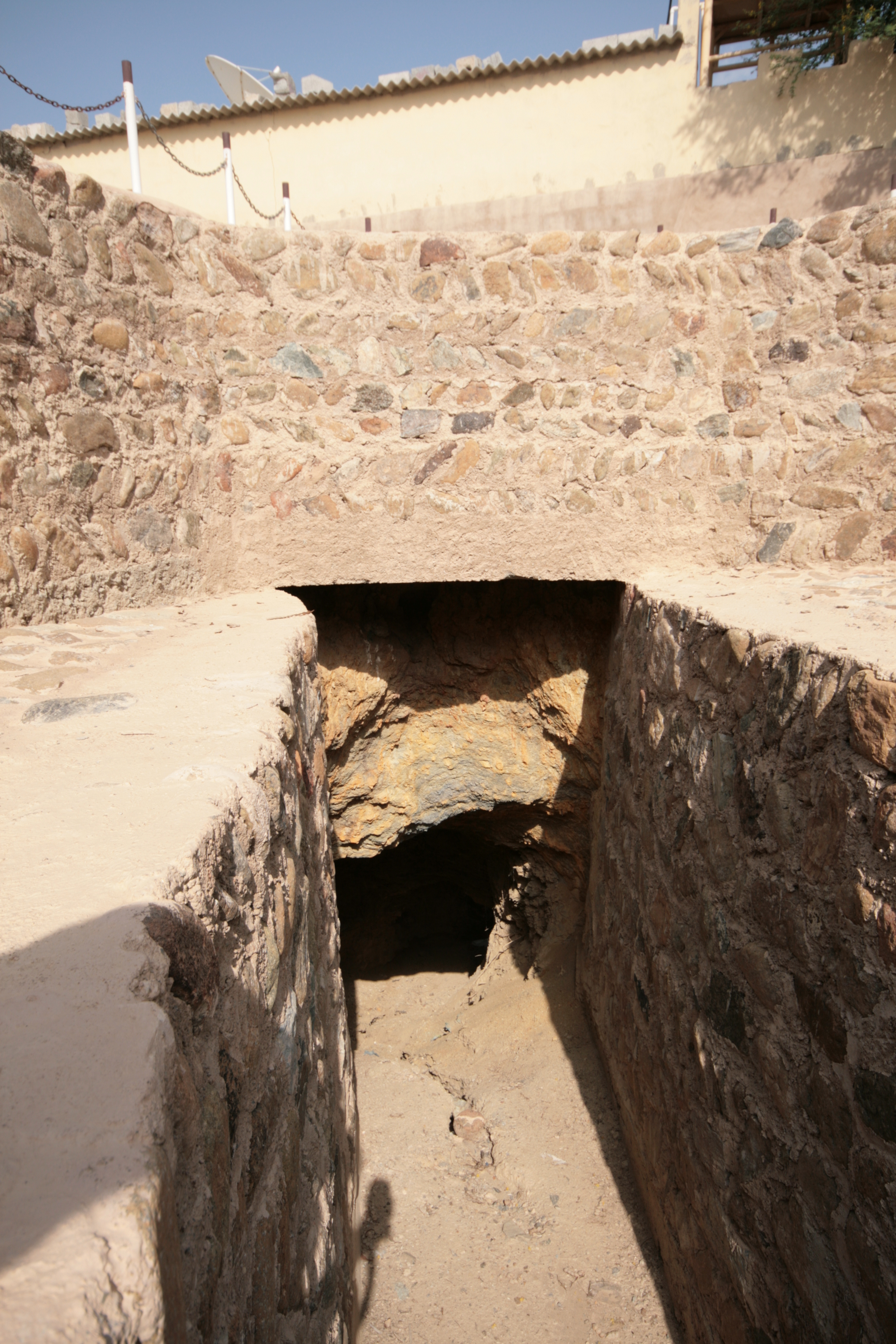 Falaj at Masafi Fort Fujairah, United Arab Emirates.